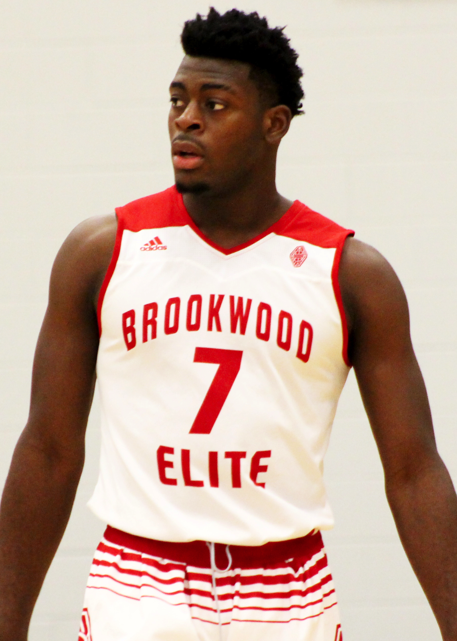 Luguentz Dort 1_wm